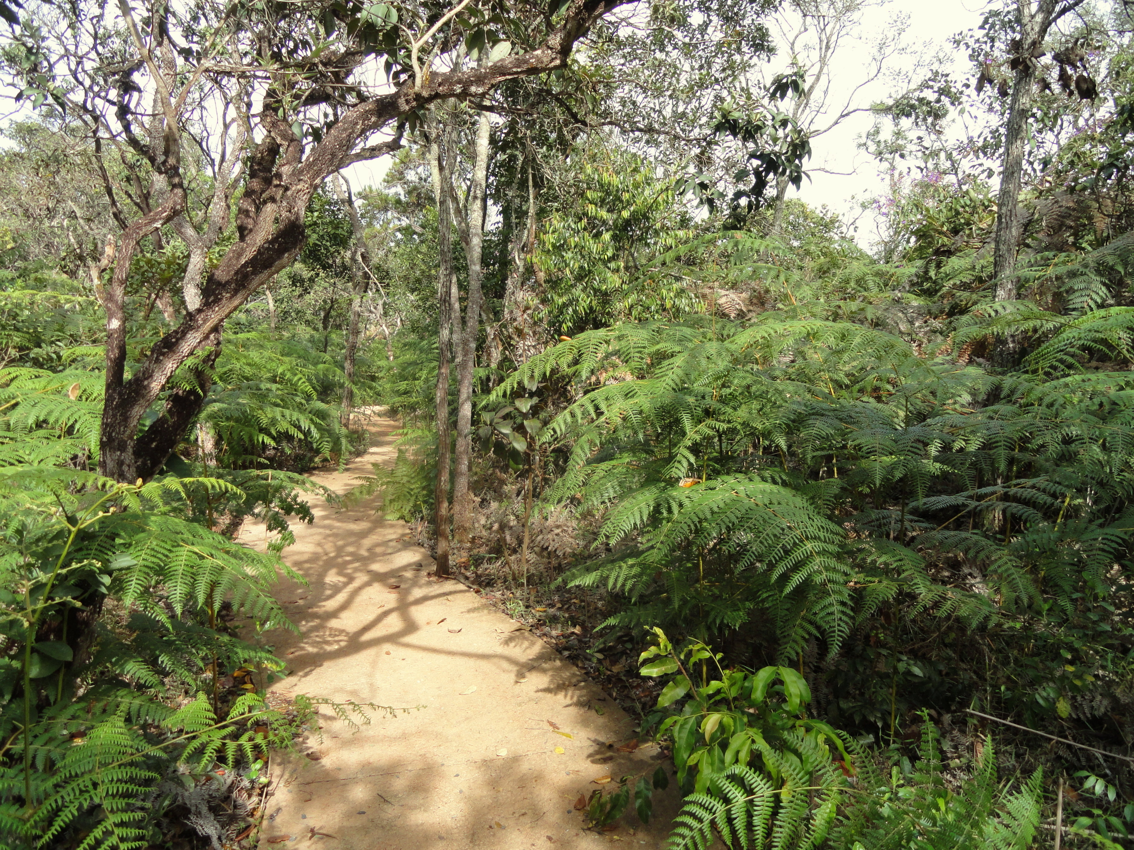 Walkway in the Jardim Botânico de Brasília, Brasília, Brazil.